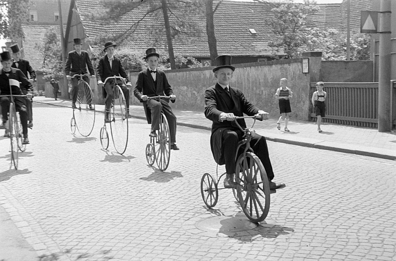 Original image description from the Deutsche Fotothek Pfingsten 1947